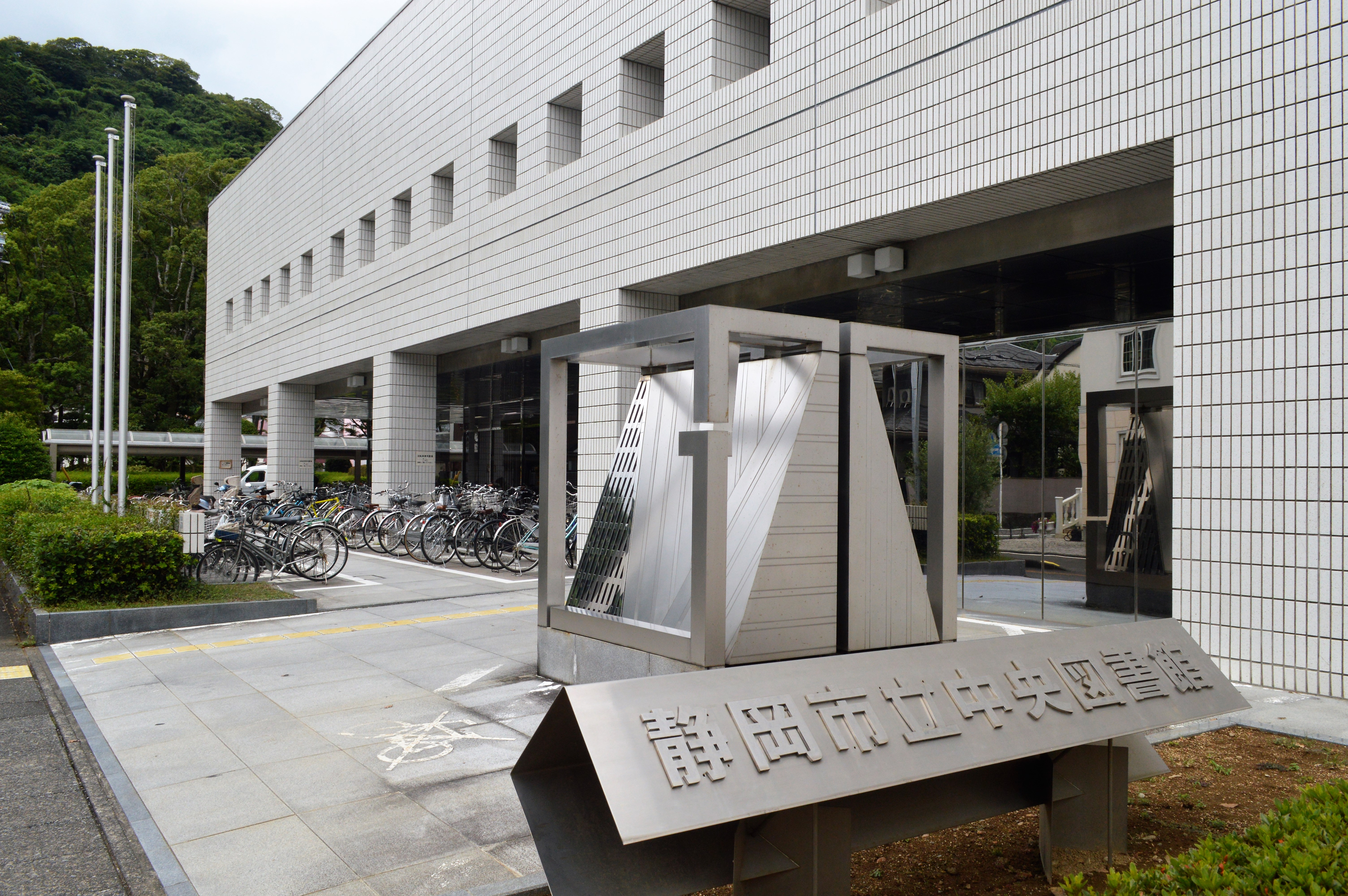 静岡市立中央図書館。